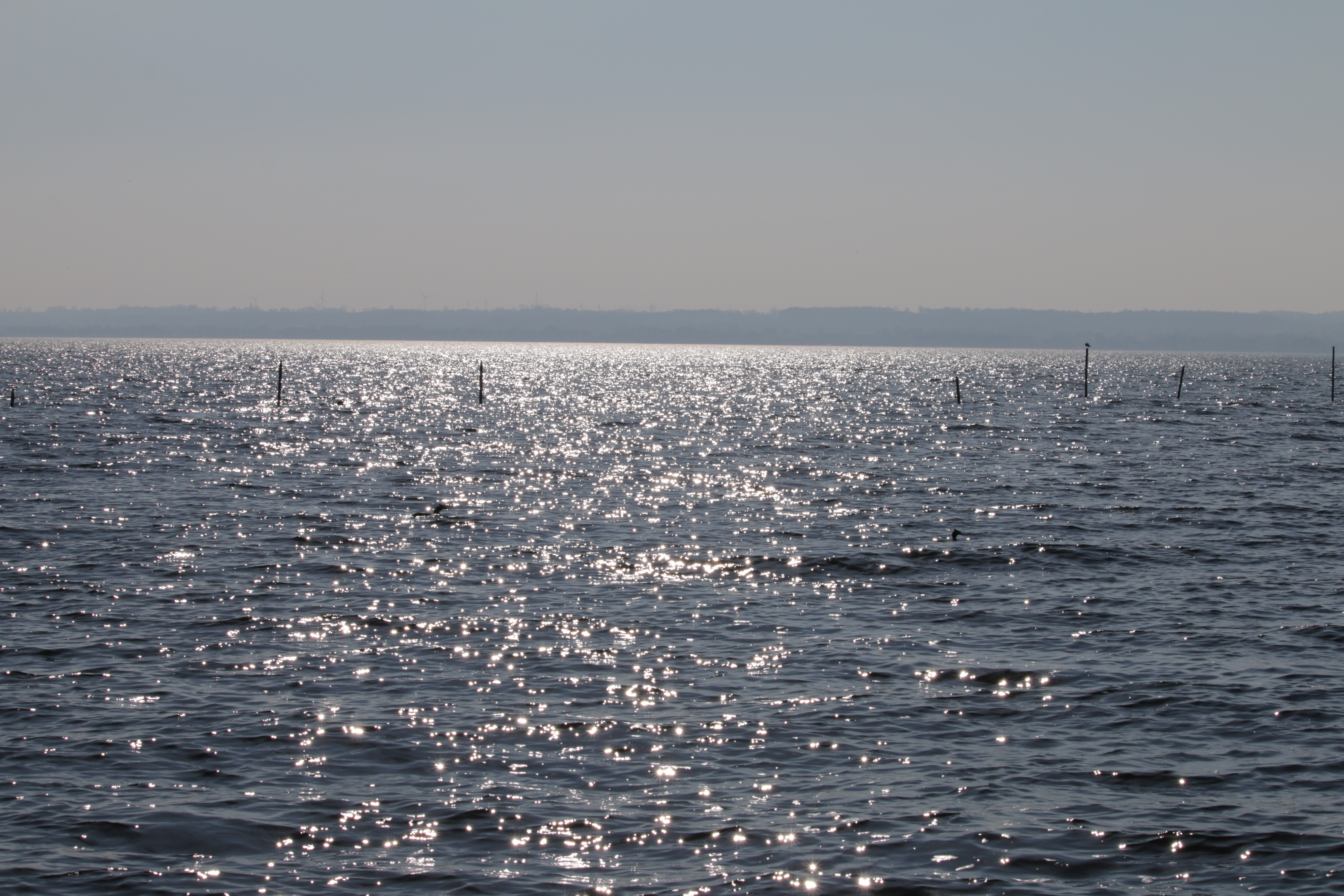 Östra Ringsjön april 2018